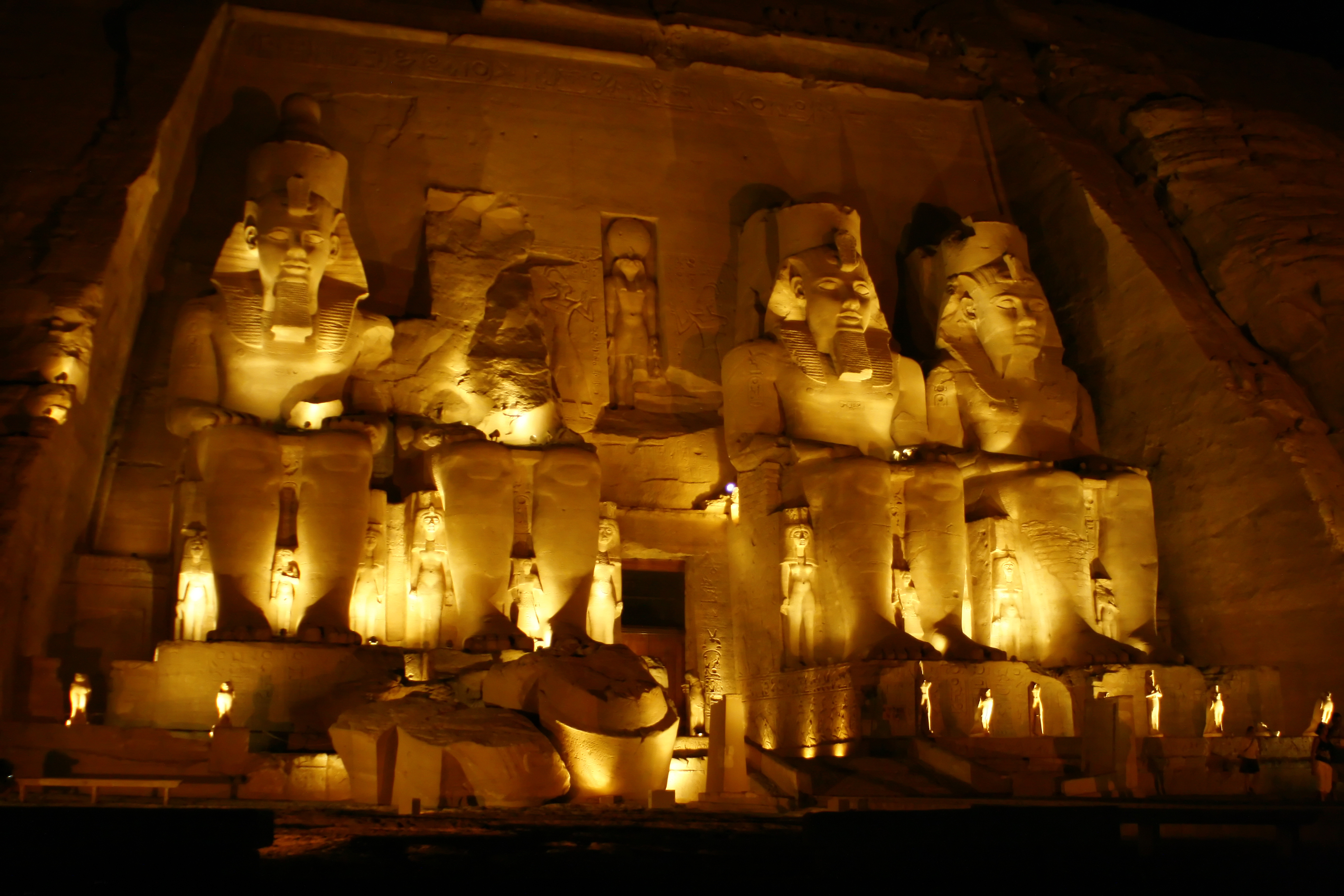 Abu Simbel